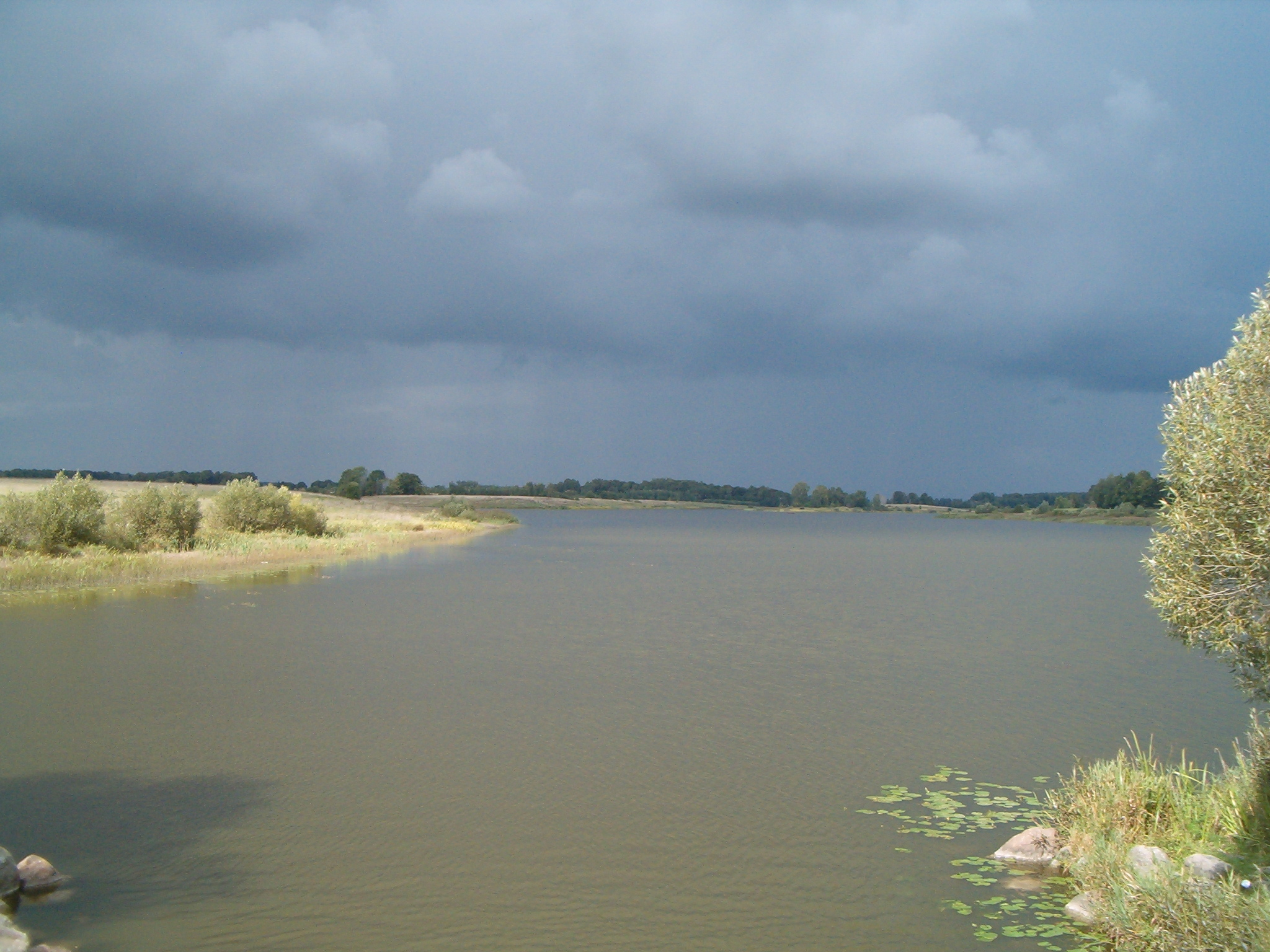 Alizavos sen., Lithuania